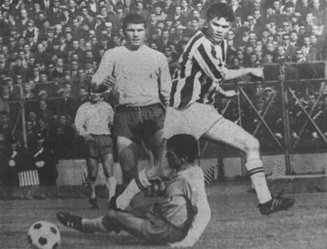 Torino, stadio Comunale, 28 febbraio 1968. Il bianconero Roger Magnusson (a destra) in azione nel corso della sfida tra Juventus ed Eintracht Braunschweig (1-0) valevole per il retour match dei quarti di finale della Coppa dei Campioni 1967-68; stante il successo gialloblù (3-2) nella gara di andata giocata in Germania Ovest il precedente 31 gennaio, dato il regolamento dell'epoca le due squadre andarono allo spareggio, disputatosi in campo neutro a Berna il 20 marzo seguente e vinto dai torinesi (1-0), i quali passarono così il turno accedendo per la prima volta nella loro storia alle semifinali della principale competizione europea per club. Lo svedese Magnusson era appellato dai media italiani come l'attaccante «di coppa» della Juventus poiché, stante l'allora blocco del calcio italiano verso l'utilizzo di giocatori stranieri nei campionati nazionali, lo svedese poté essere schierato dai piemontesi unicamente nelle manifestazioni europee.